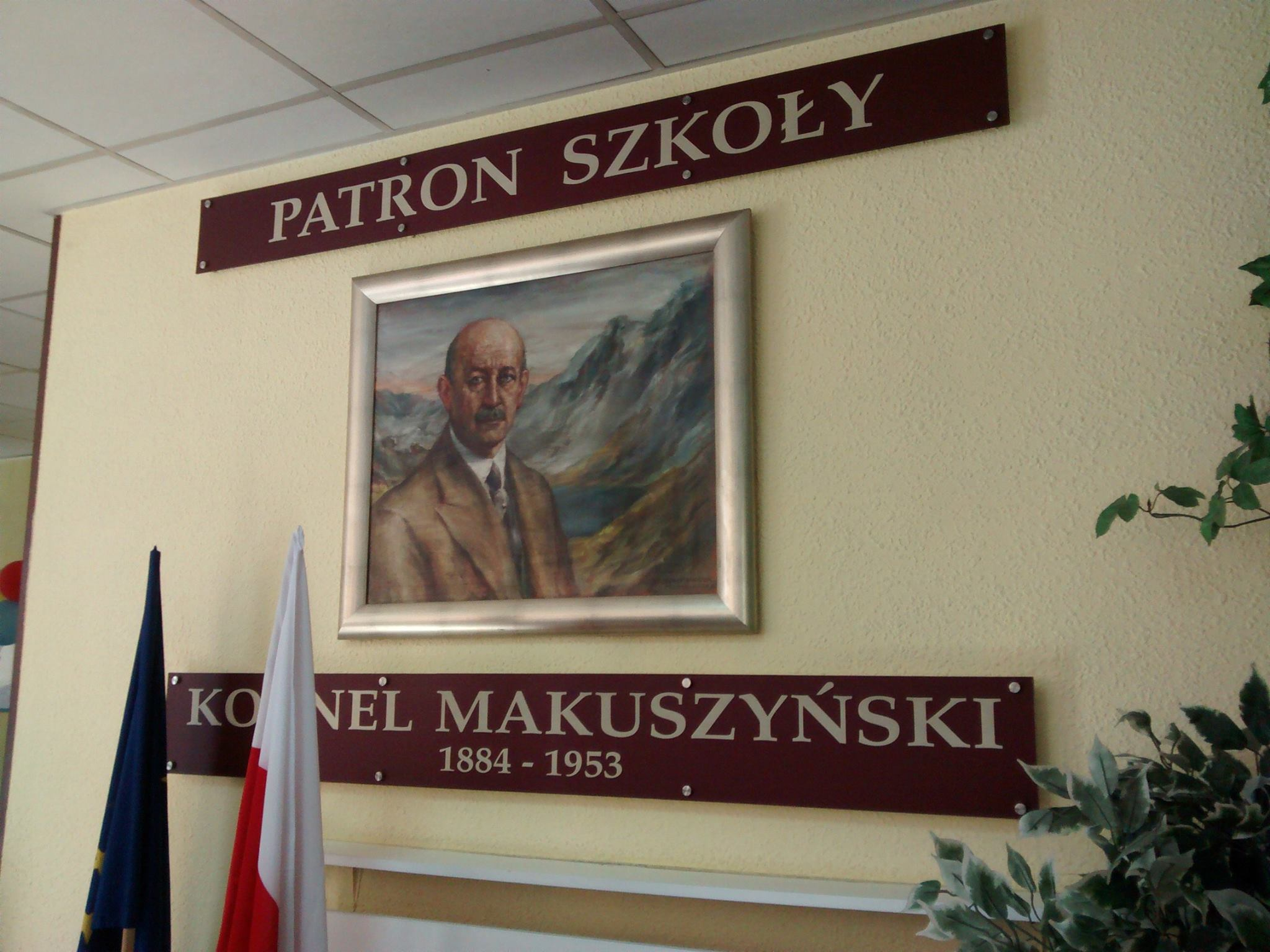 We wnętrzu Szkoły Podstawowej nr 45 im. Kornela Makuszyńskiego w Katowicach, przy ul. Janusza Korczaka 11